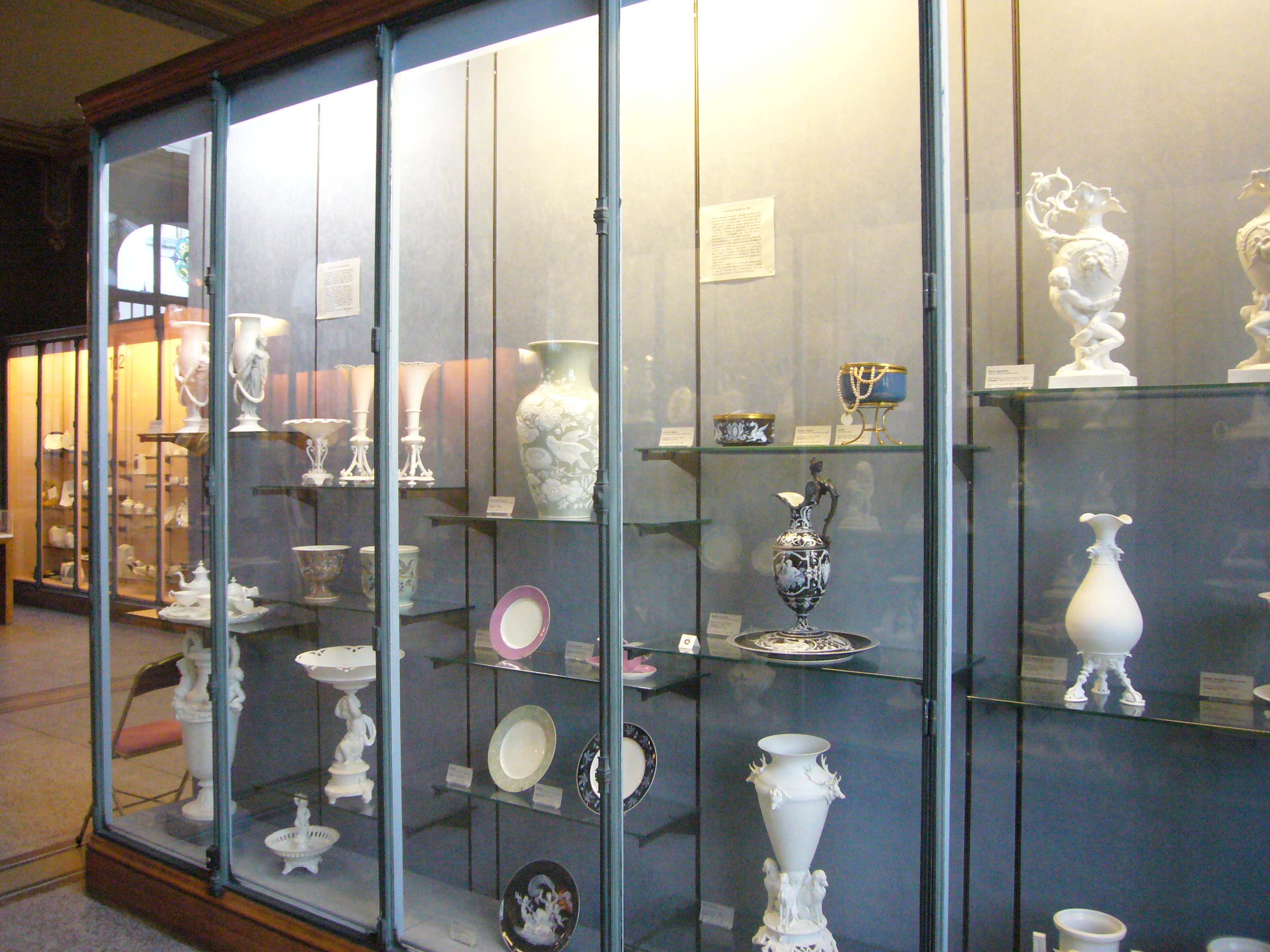 Vitrines du musée Adrien Dubouché de Limoges (Haute-Vienne, France)